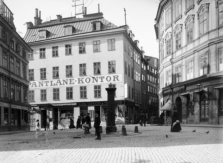 Järntorget mot Västerlånggatan med Järntorgsbrunnen